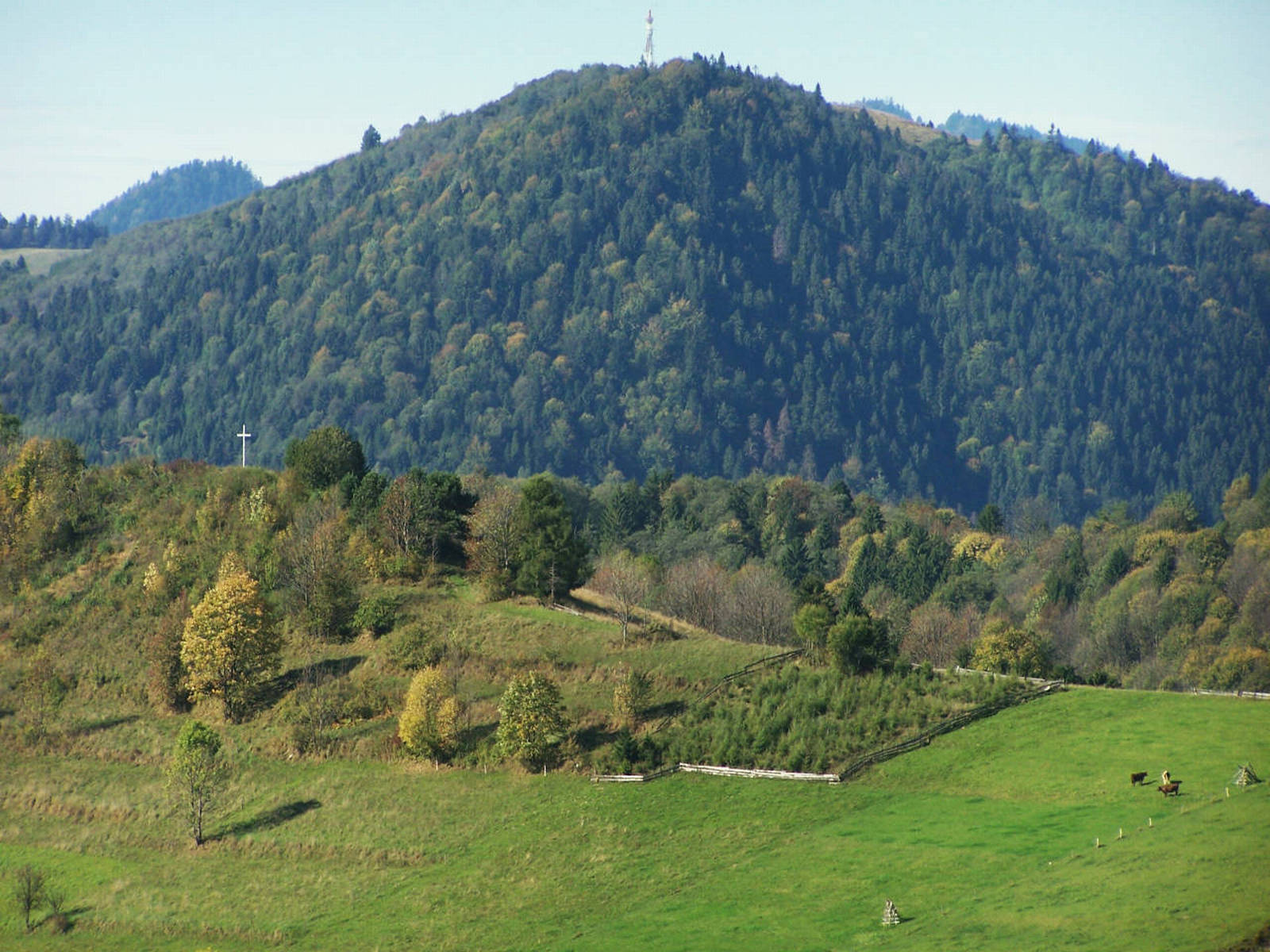 Jarmuta, Czuprana (Małe Pieniny)